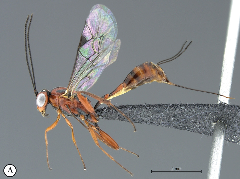 Habitus der Schlupfwespe Pristomerus kagga von der Seite, aus Südafrika, aus der Originalbeschreibung von P. Rousse & S. Noorts, 2015